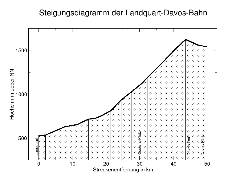 Steigungsdiagramm der Landquart-Davos-Bahn